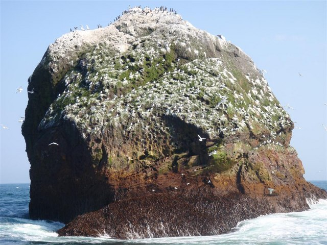 Rockall